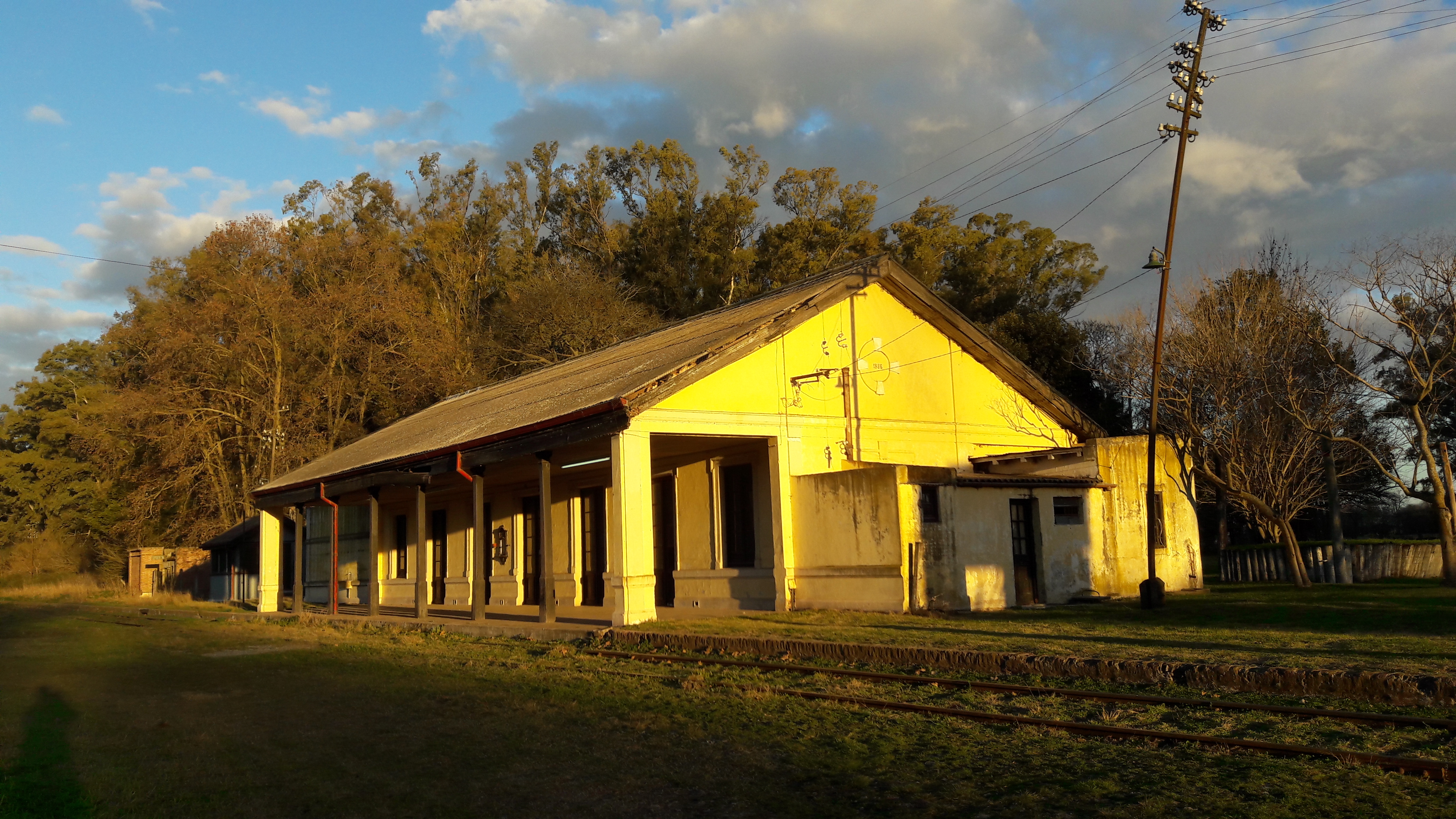 Estación